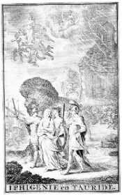 Couverture, gravure, du livret d' Iphigénie en Tauride = Opéra